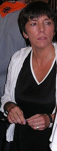 Margot Käßmann im Gespräch mit einer Teilnehmerin auf dem Deutschen Evangelischen Kirchentag 2007 am 08.06.2007.